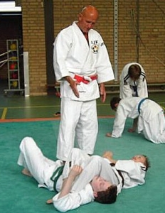 Jan Snijders